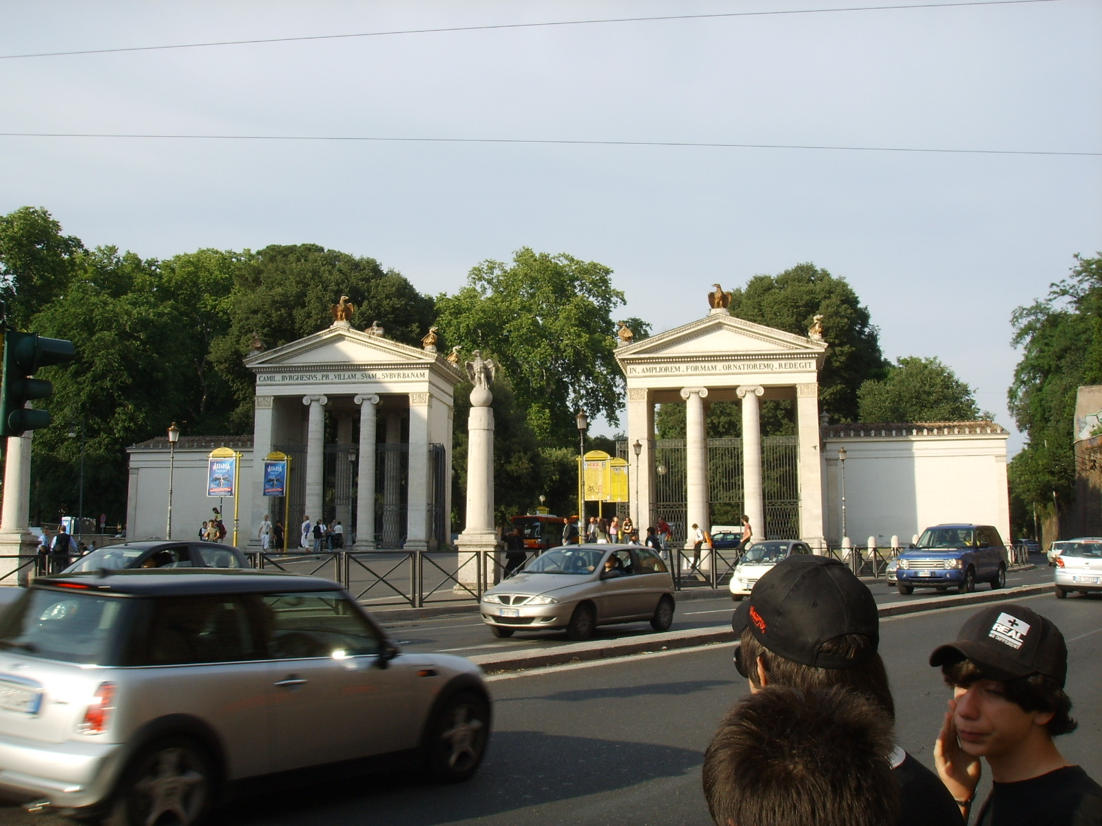 Piazzale Flaminio, ingresso di Villa Borghese in Rome, Italy